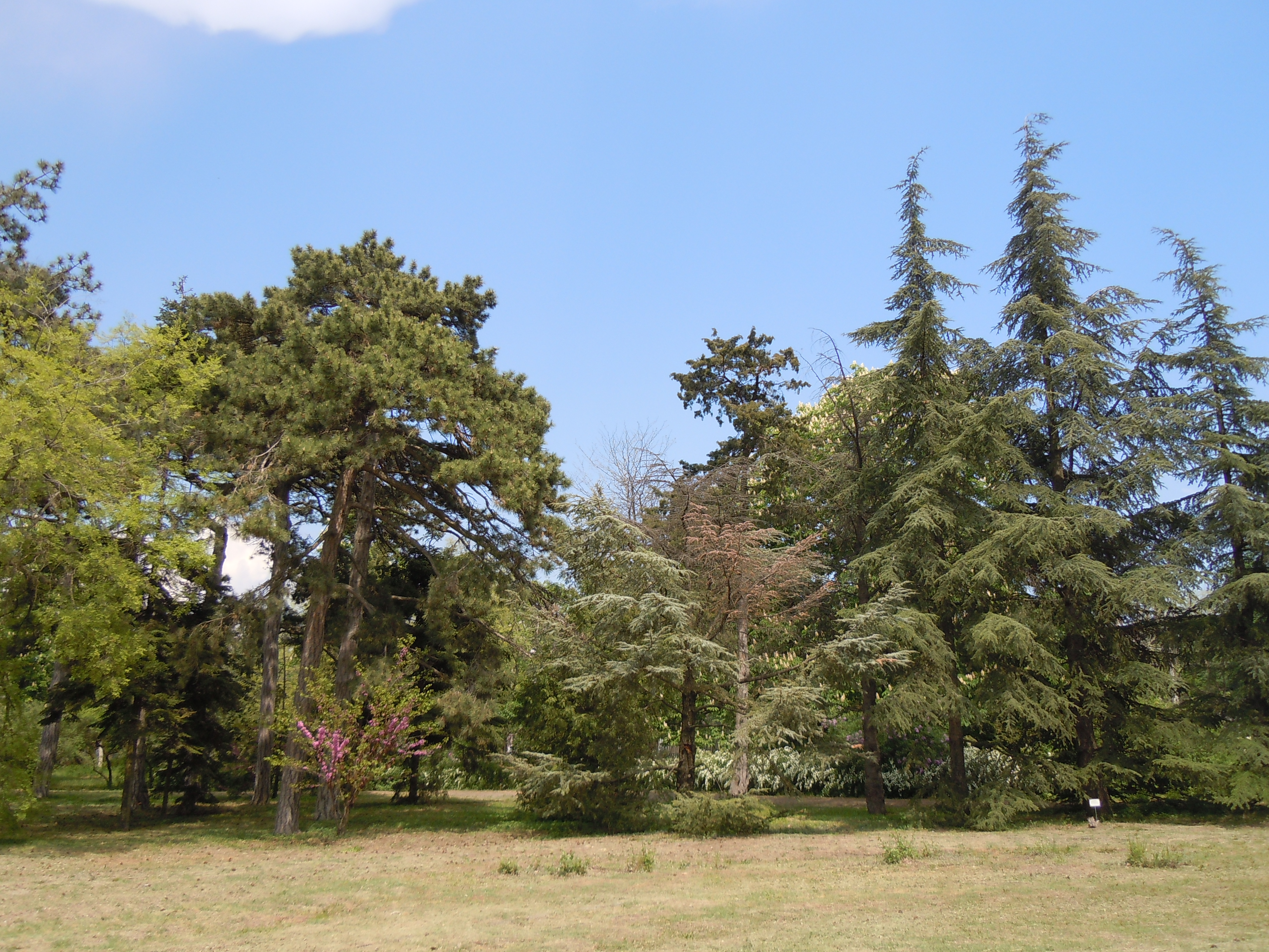 Ботанічний сад ОНУ, м. Одеса, Французький бульвар, 48/50, 87